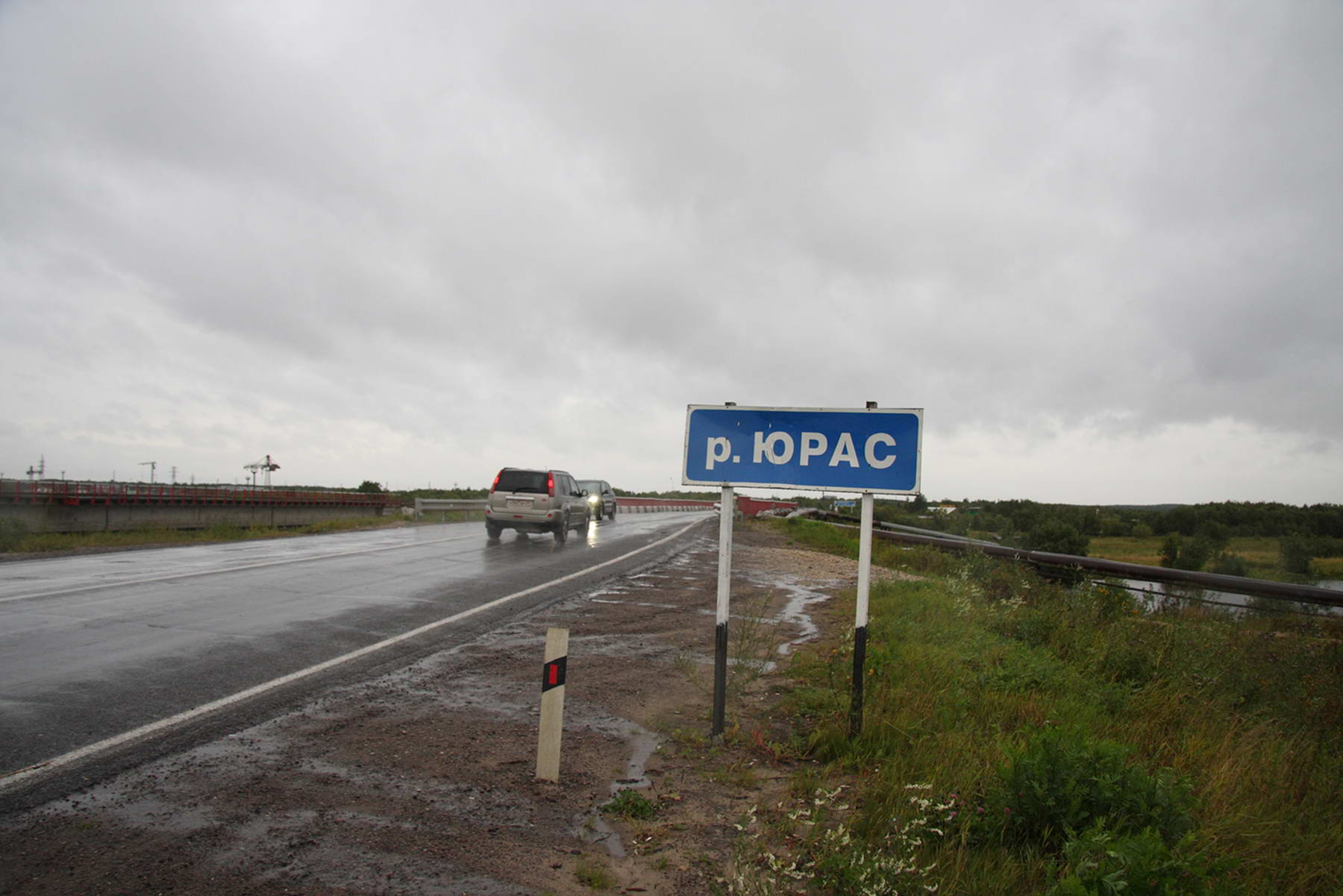 железнодорожный и автомобильный мосты через реку Юрас на талажском шоссе